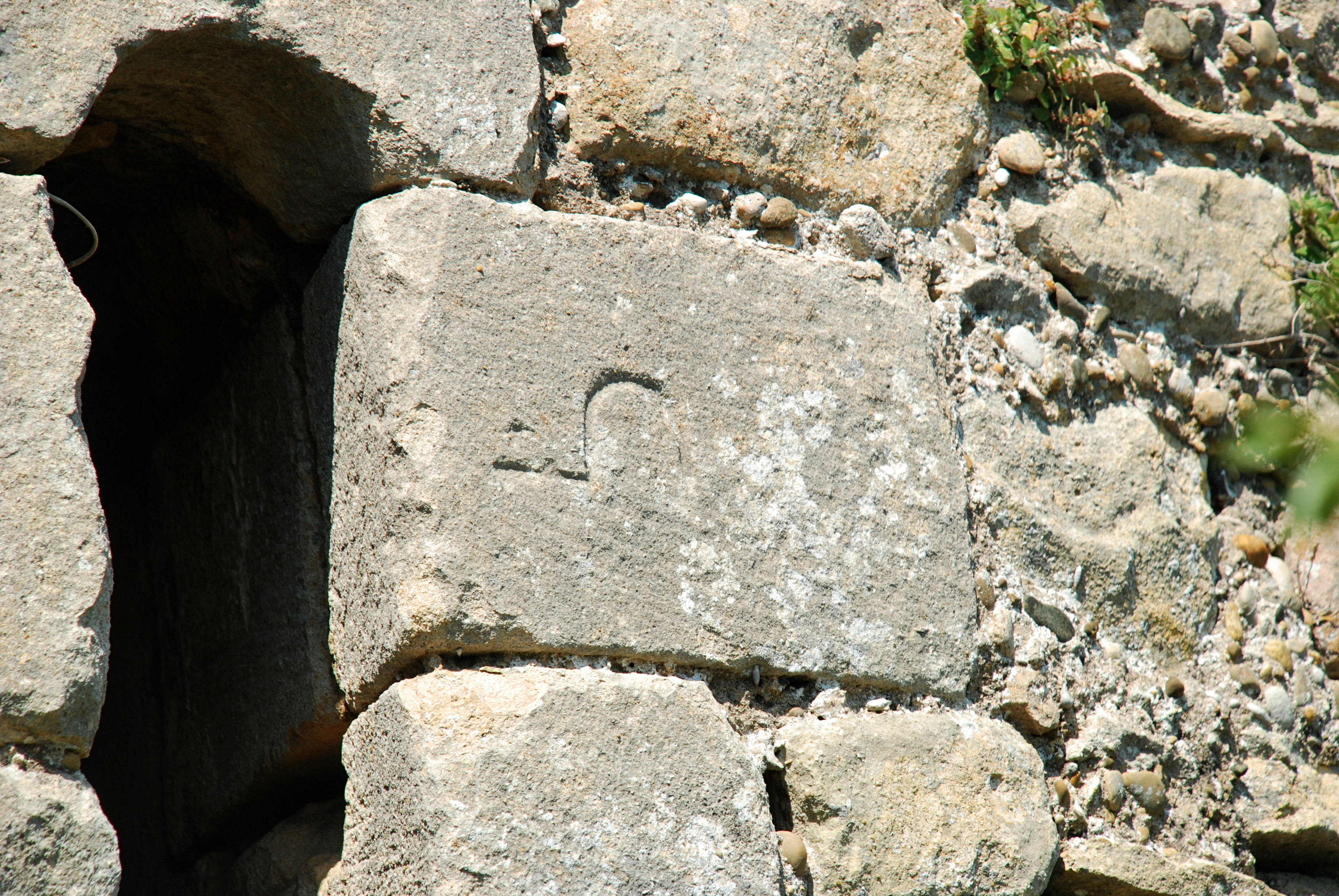 France - Gard - Saint-Étienne-des-Sorts - Chapelle Saint-Pierre